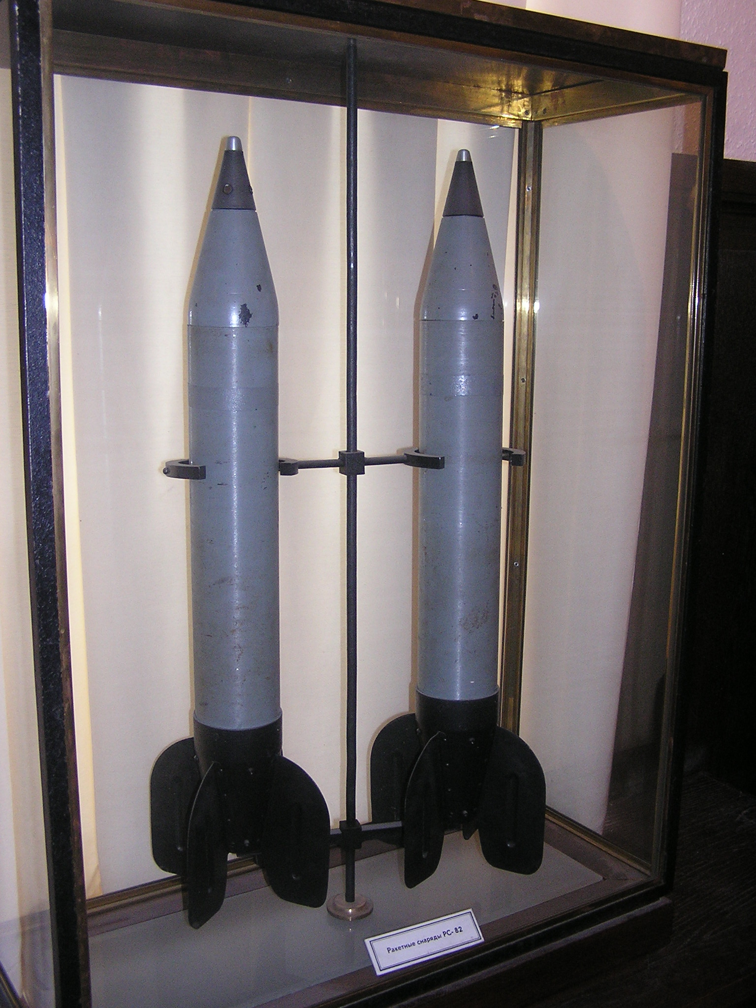 Музей космонавтики и ракетной техники (в Иоанновском равелине Петропавловской крепости). Ракетные снаряды РС-82 This photograph was taken in Museum of Space and Missile Technology (Saint Petersburg) Object location59° 57′ 07″ N, 30° 19′ 16″ E